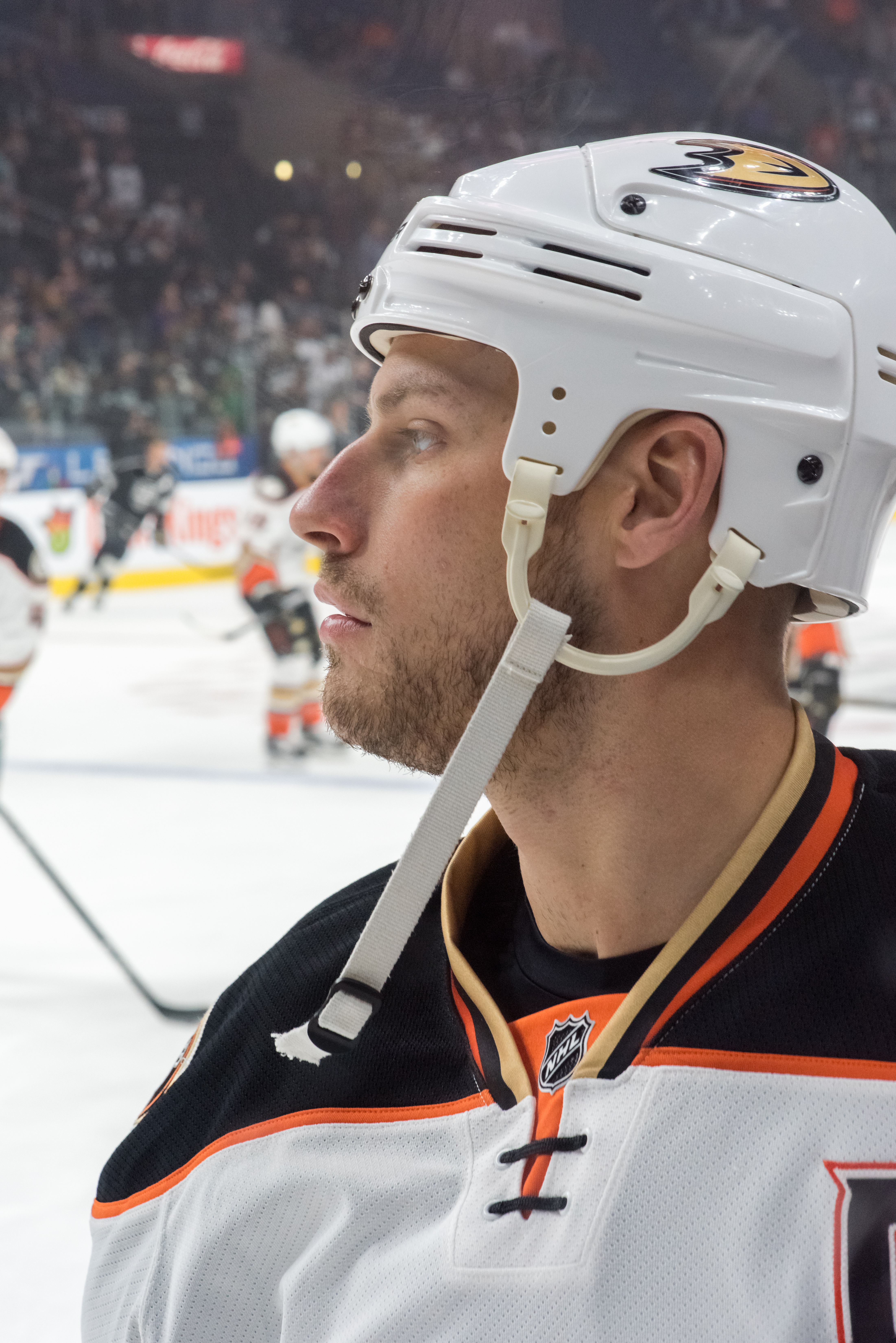 Ryan Getzlaf